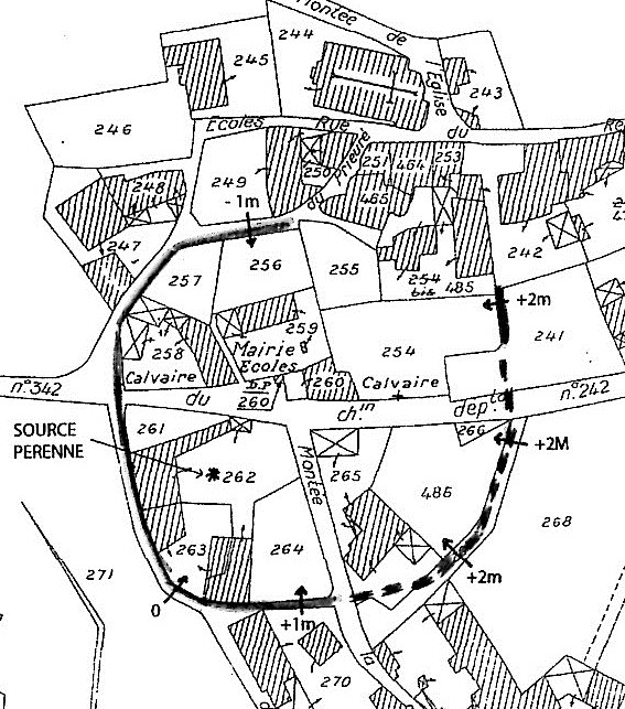 Vinzieux détail